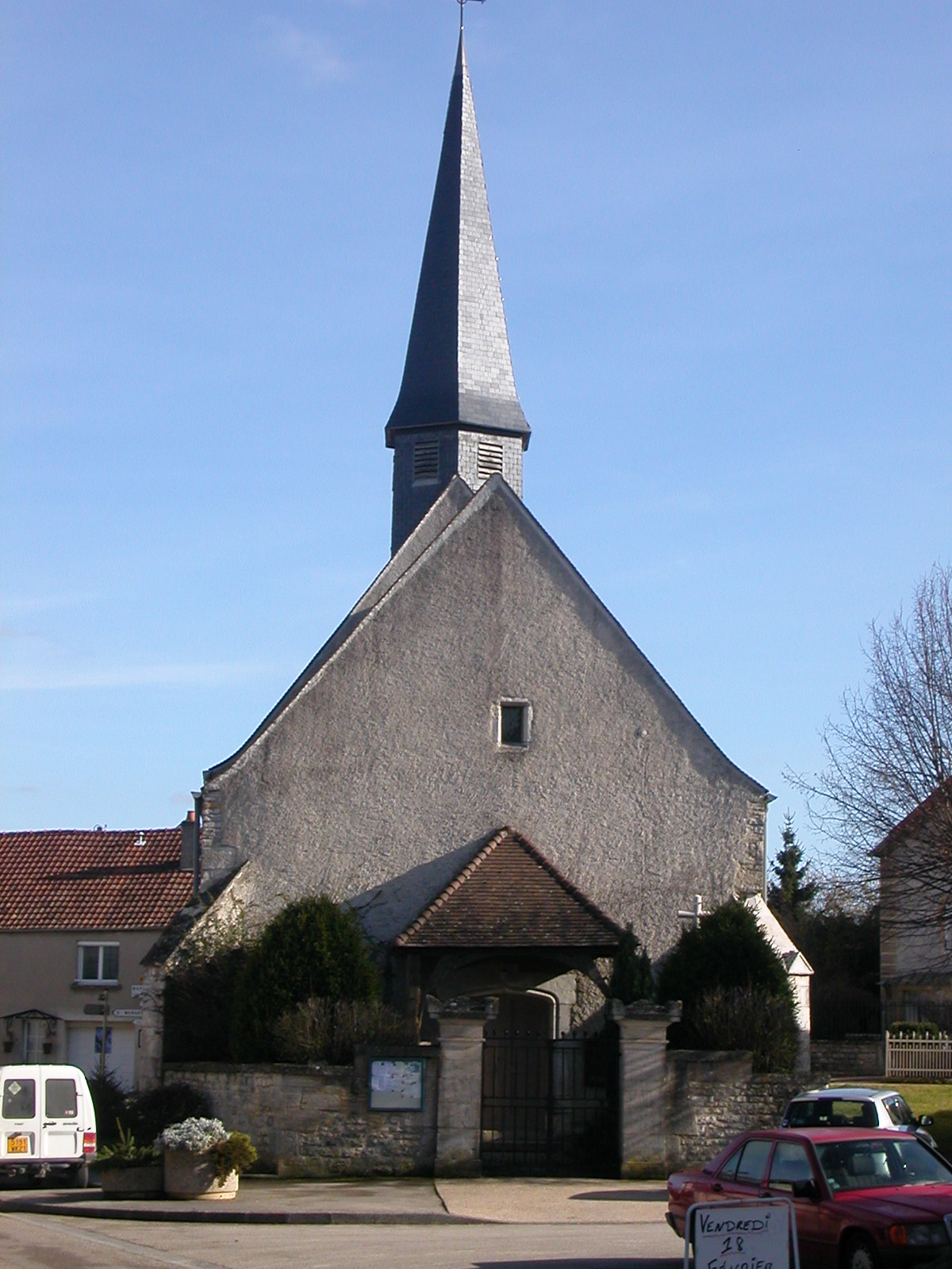 ÉGLISE SAINT SÉBASTIEN DE BELLEFOND (Côte d'or) En 1533 le Cardinal Duprat, légat de France, accorde aux « manants » de Bellefond, l’autorisation d’ériger une église. Celle-ci devrait faire à l’origine 12m x 8m, c'est-à-dire la dimension du chœur actuel. En 1541, l’église de Bellefond est consacrée à Saint Sébastien. On ne connaît pas les dates des différentes phases modificatives de l’architecture initiale : destruction de la voûte du chœur, création d’un clocheton sur le chœur, création de la nef actuelle. En 1750, Saint-Sébastien est érigée en cure. En 1854, un projet de restauration avec extension de l’édifice en partie ouest, avec un clocher de 17m de haut est envisagé. Le clocher pointu est de réalisation récente.